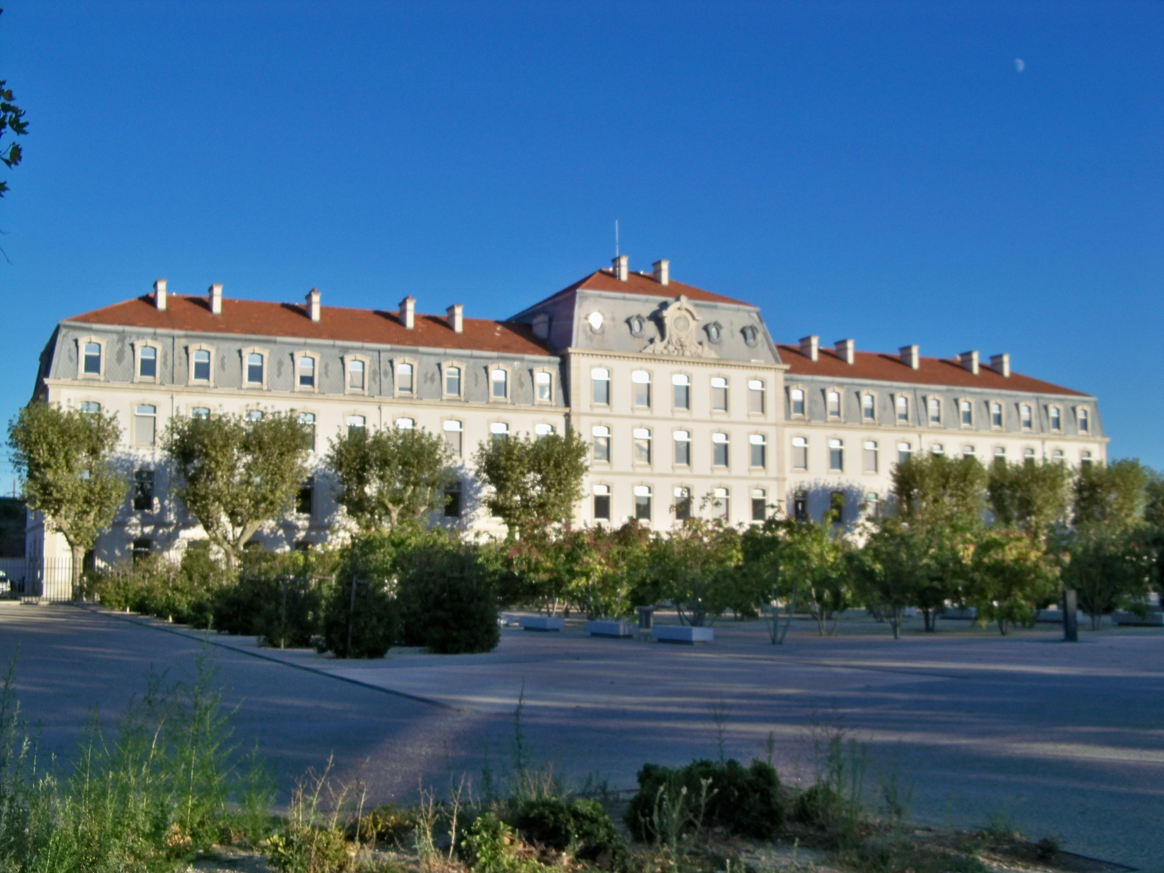 Préfécture du Vaucluse (84)